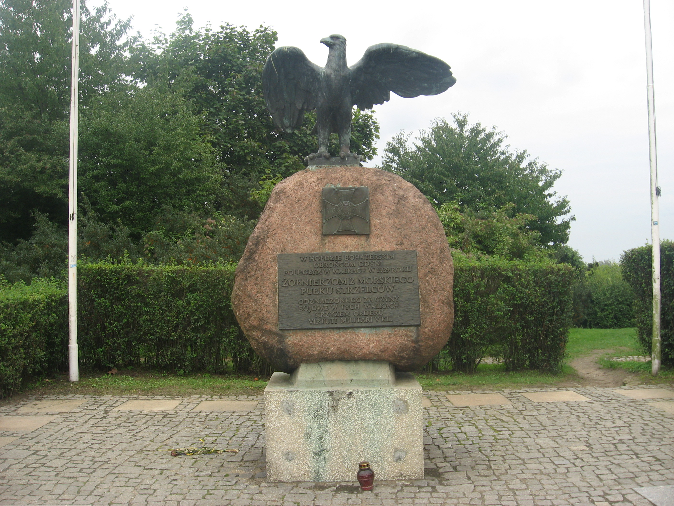 Pomnik Obrońców Gdyni 1939